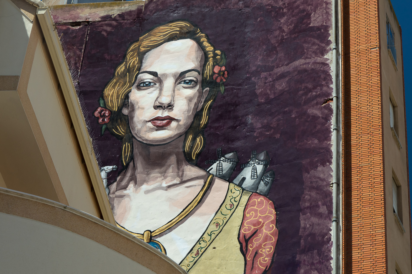 Lúcida locura - 25 Quintanar de la Orden.